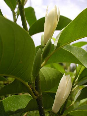 Flower: White Champaka/Photo taken by User:Loma